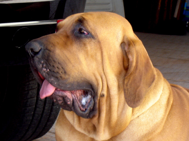 ANABEL DA ORLA DO FILA